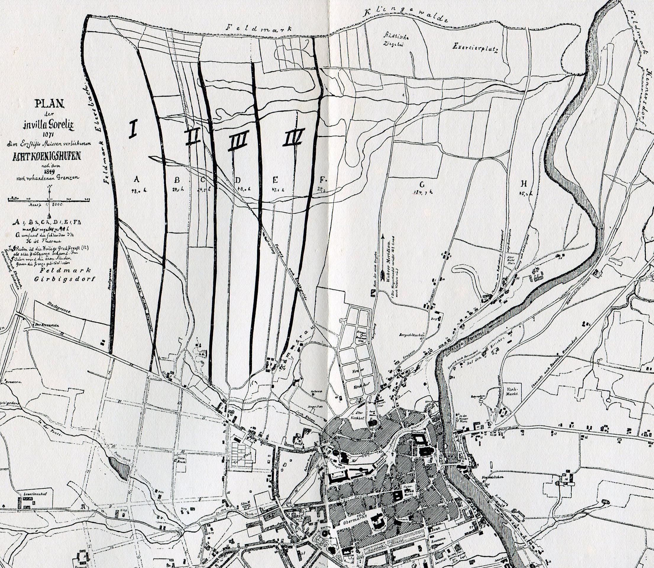 Plan der invilla Goreliz (Görlitz) 1071 dem Erzstifte Meissen verliehenen acht Königshufen nach ihren 1849 noch vorhandenen Grenzen (1850)